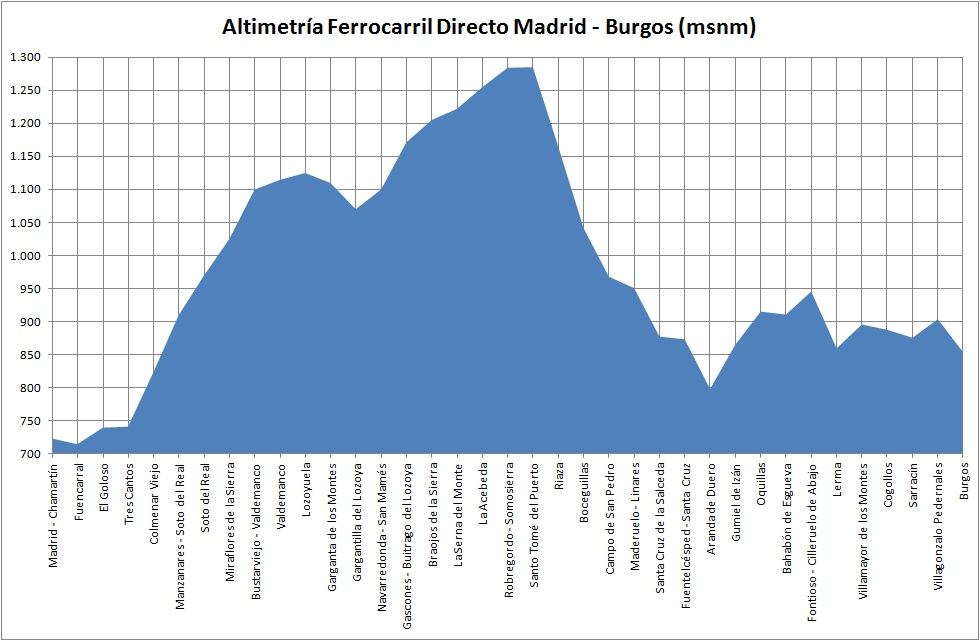 Perfil altimétrico de la línea de ferrocarril entre Madrid y Burgos